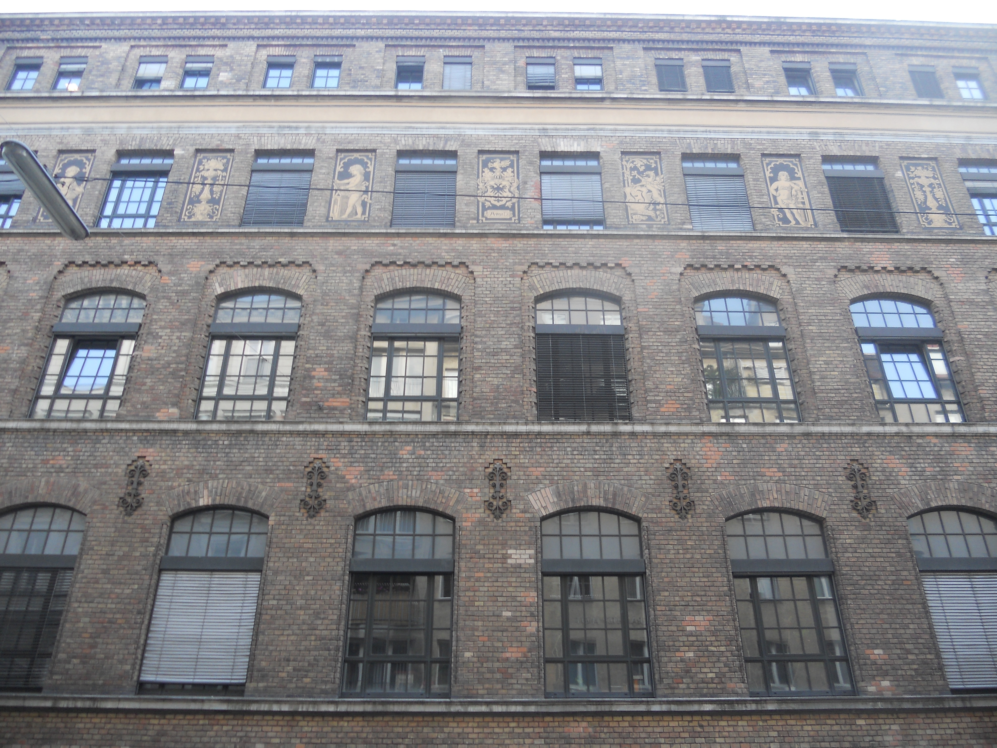 Haus Tongasse 10-12, heute Teil der Geologischen Bundesanstalt